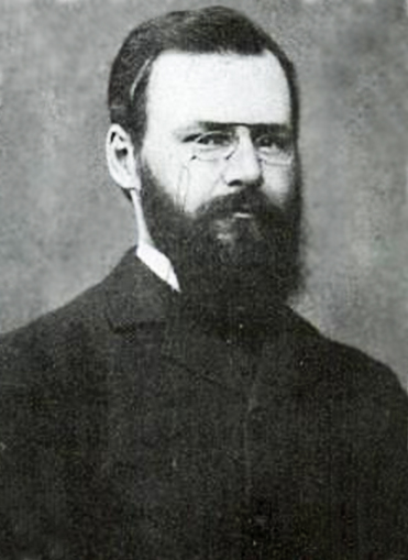 Armand Peltzer (°1849)